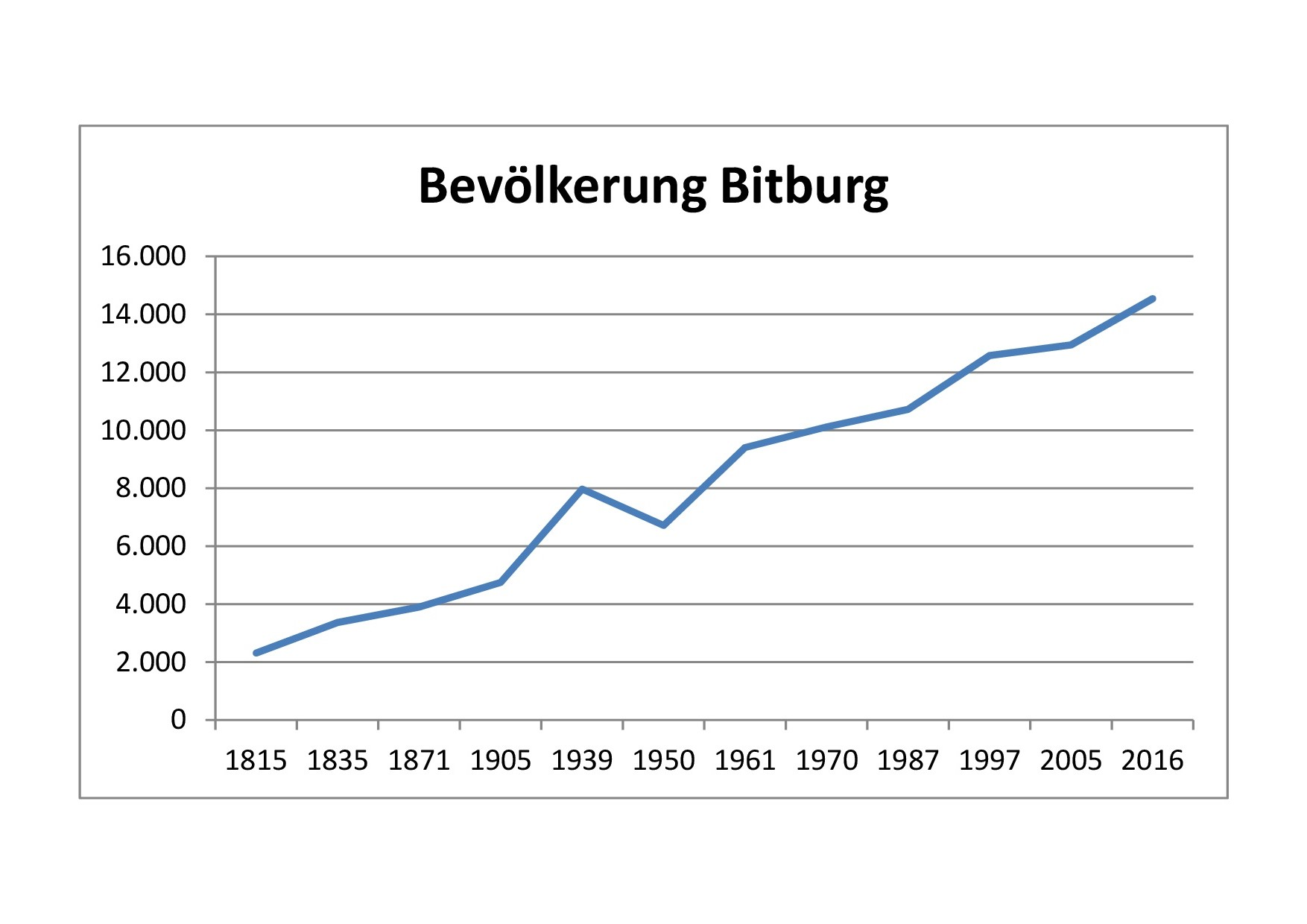 54634 Bitburg. Bevölkerungsentwicklung mit den Stadtteilen. Erstellung der Tabelle von 2018.